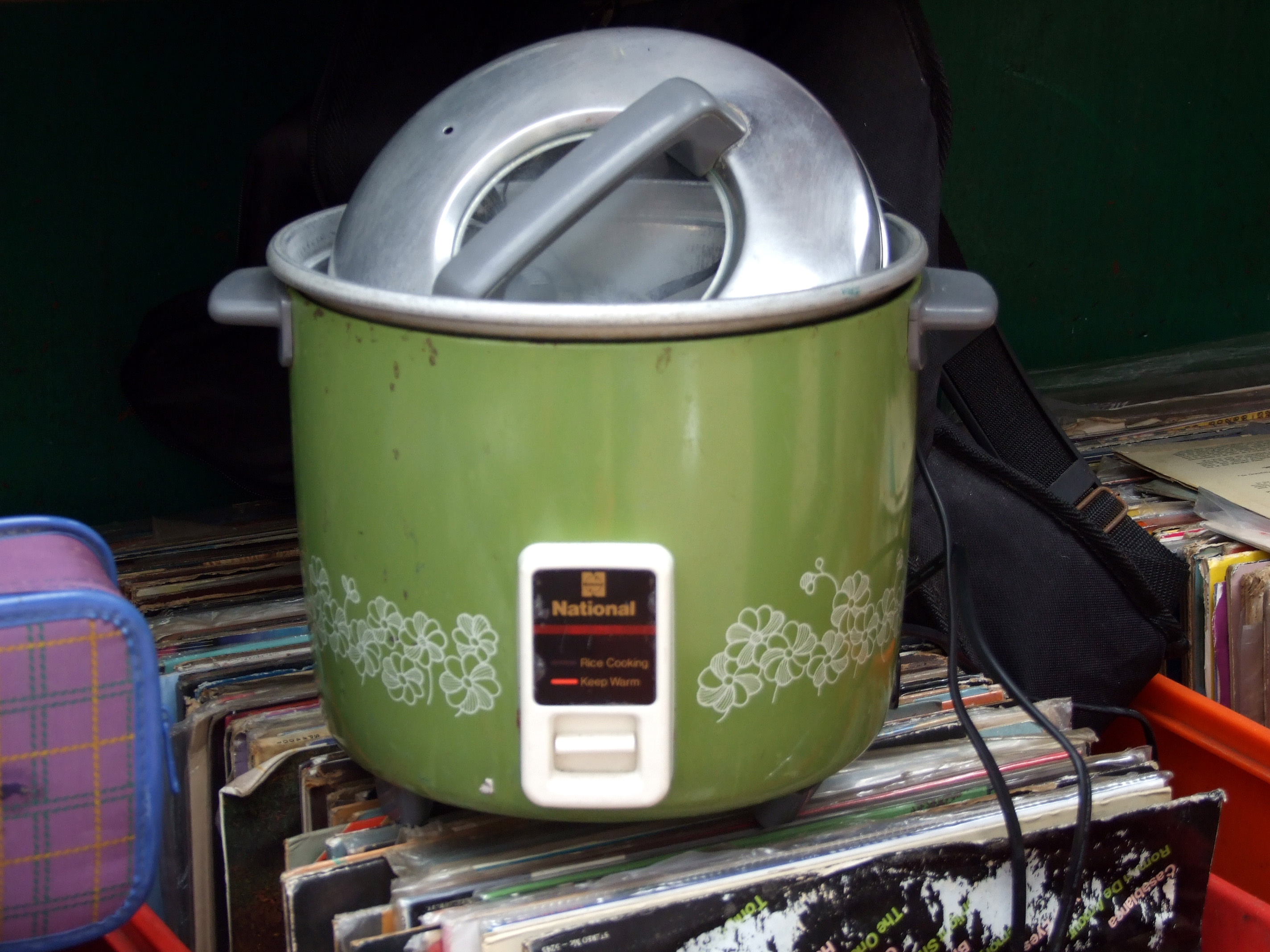 中文（香港）: 附有玻璃窗蓋的樂聲牌電飯煲。